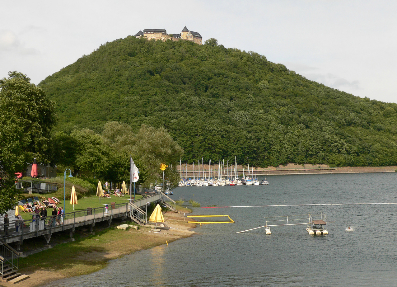 Strandpromenade Waldeck